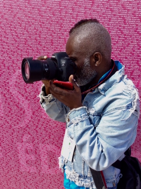 Reportage photo La Parisienne édition 2019